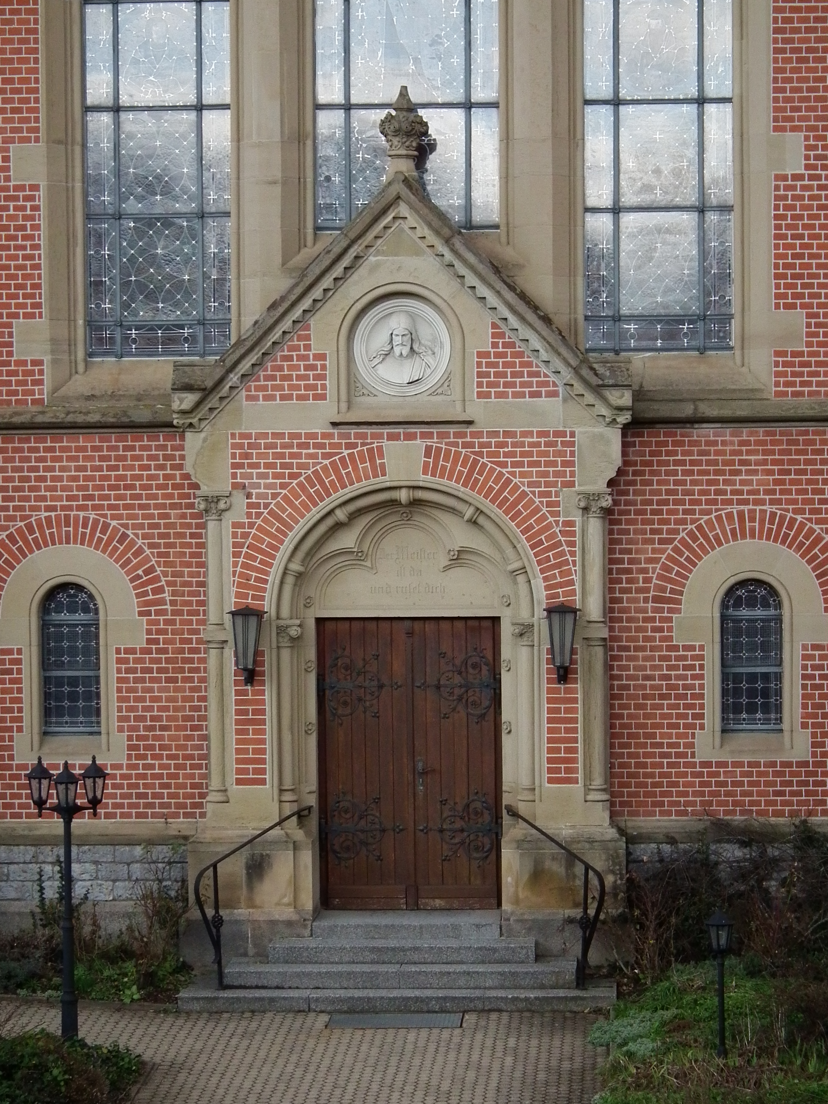 Haupteingang der Johannes-Calvin-Kirche im Mannheimer Stadtteil Friedrichsfeld (Baden-Württemberg, Deutschland)